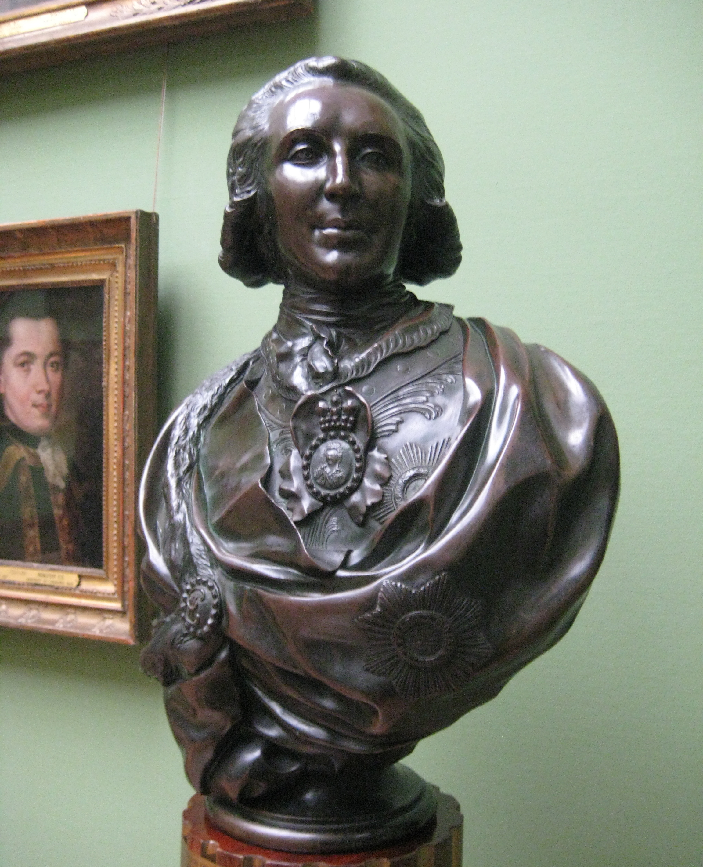 Платон Зубов. Бюст работы Ф. Шубина. Бронза 1795. ГТГ